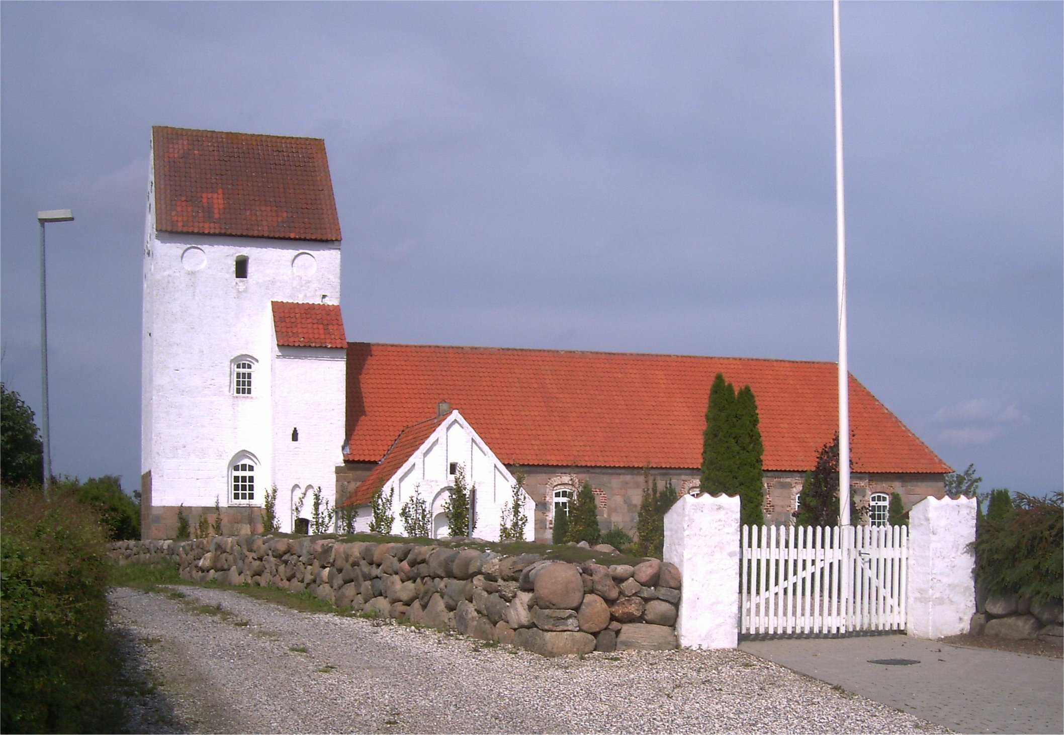 Holbæk Kirke,Rougsø Kommune